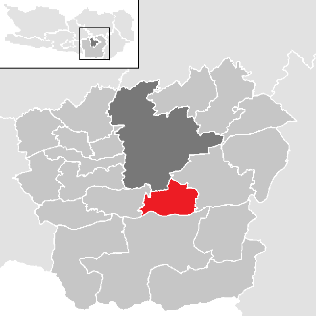 Bezirk Klagenfurt-Land